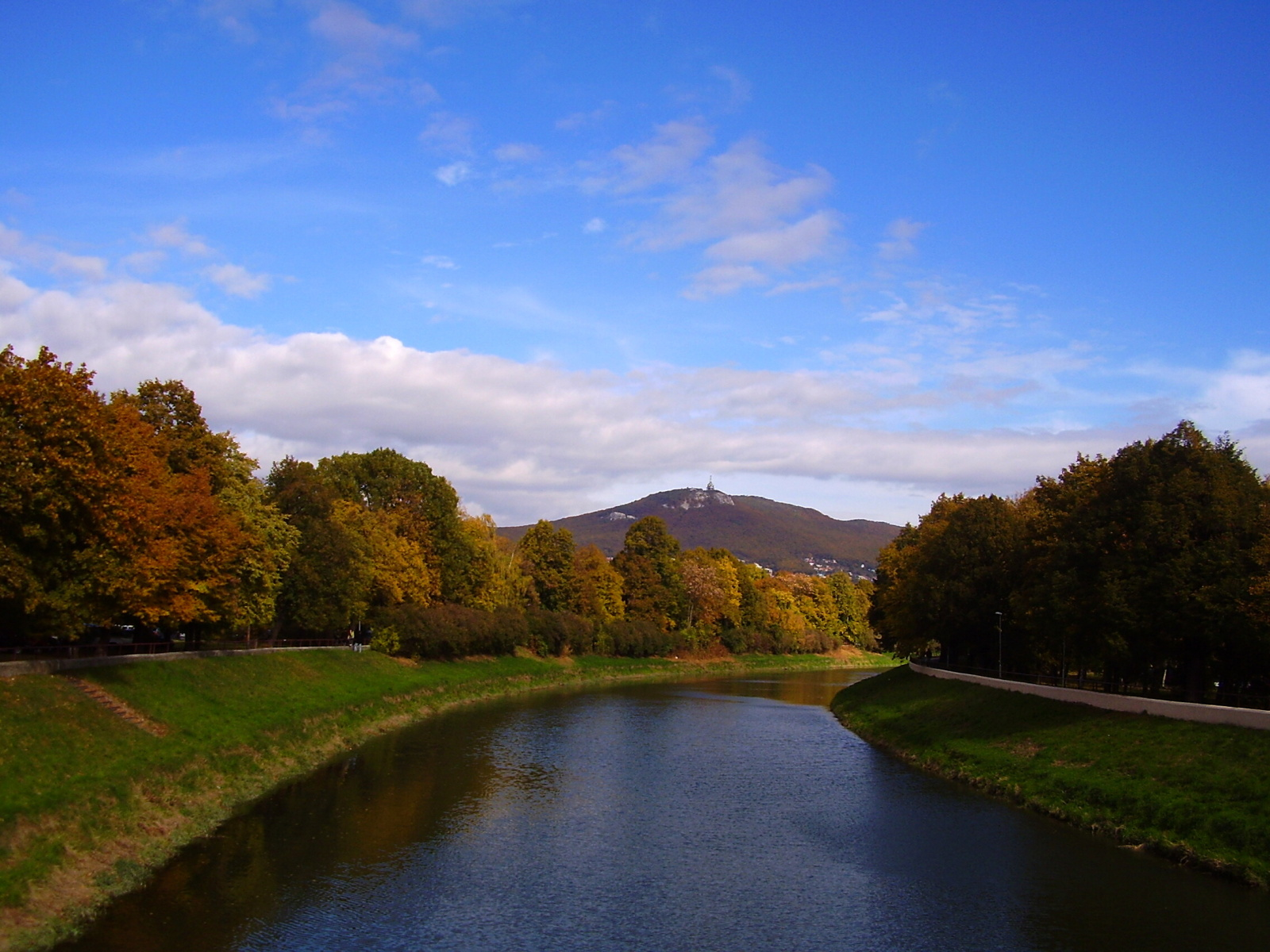 Rieka Nitra.